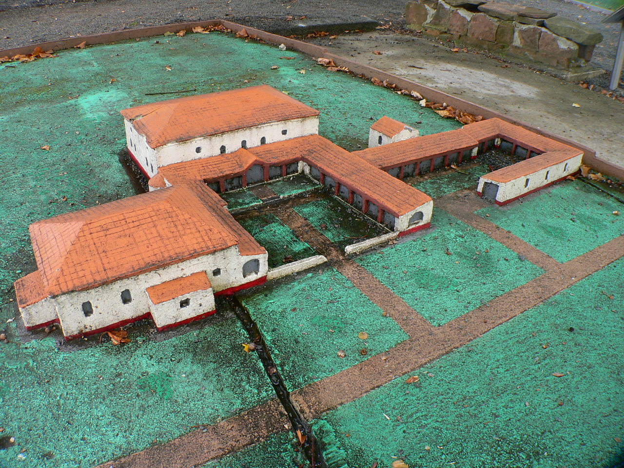 Römische Villa Haselburg im Odenwald, Hessen, Modell des Herrenhauses erstellt von Reinhold Fischer, Mühltal